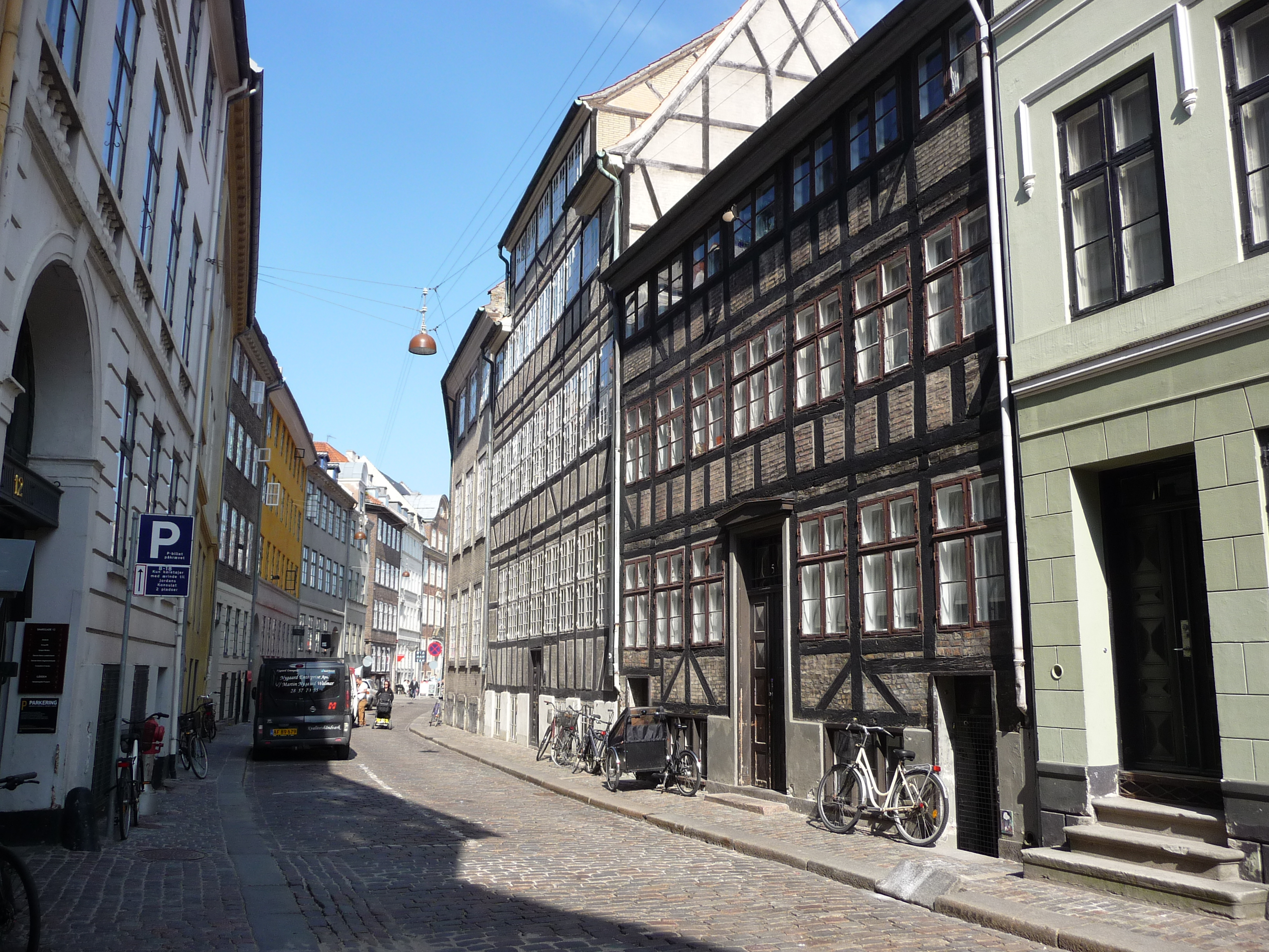 Snaregade un Copenhagen, Denmark